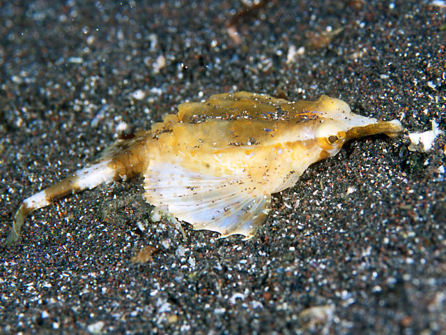 テングノオトシゴ Pegasus laternarius